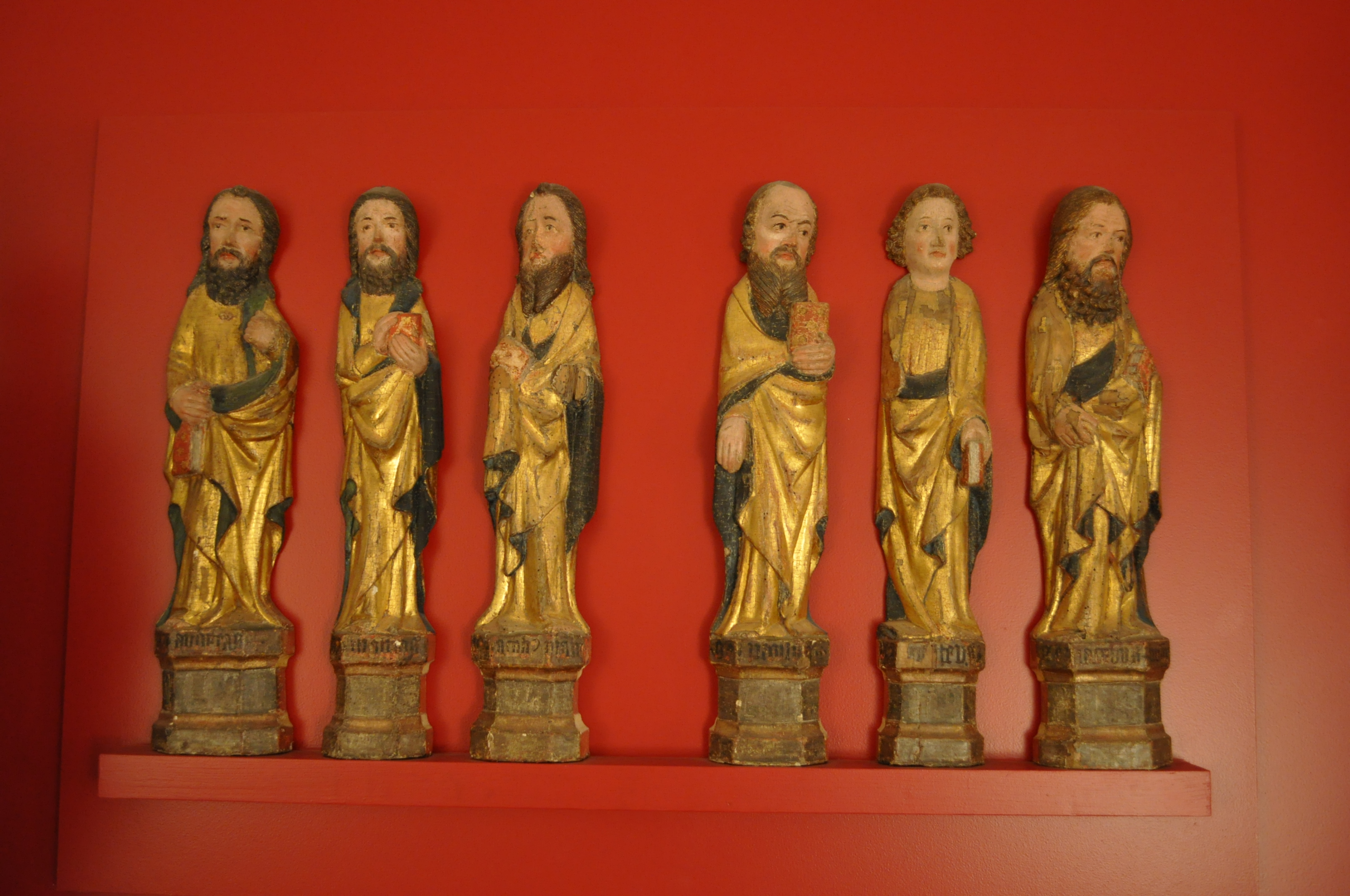 Sechs Apostel aus einem Altarretabel: Andreas, Matthäus, Jacobus d. Ä., Paulus, Petrus, Jacobus d. J., Anfang 15 Jahrhundert im Kunstmuseum Kloster Unser Lieben Frauen in Magdeburg